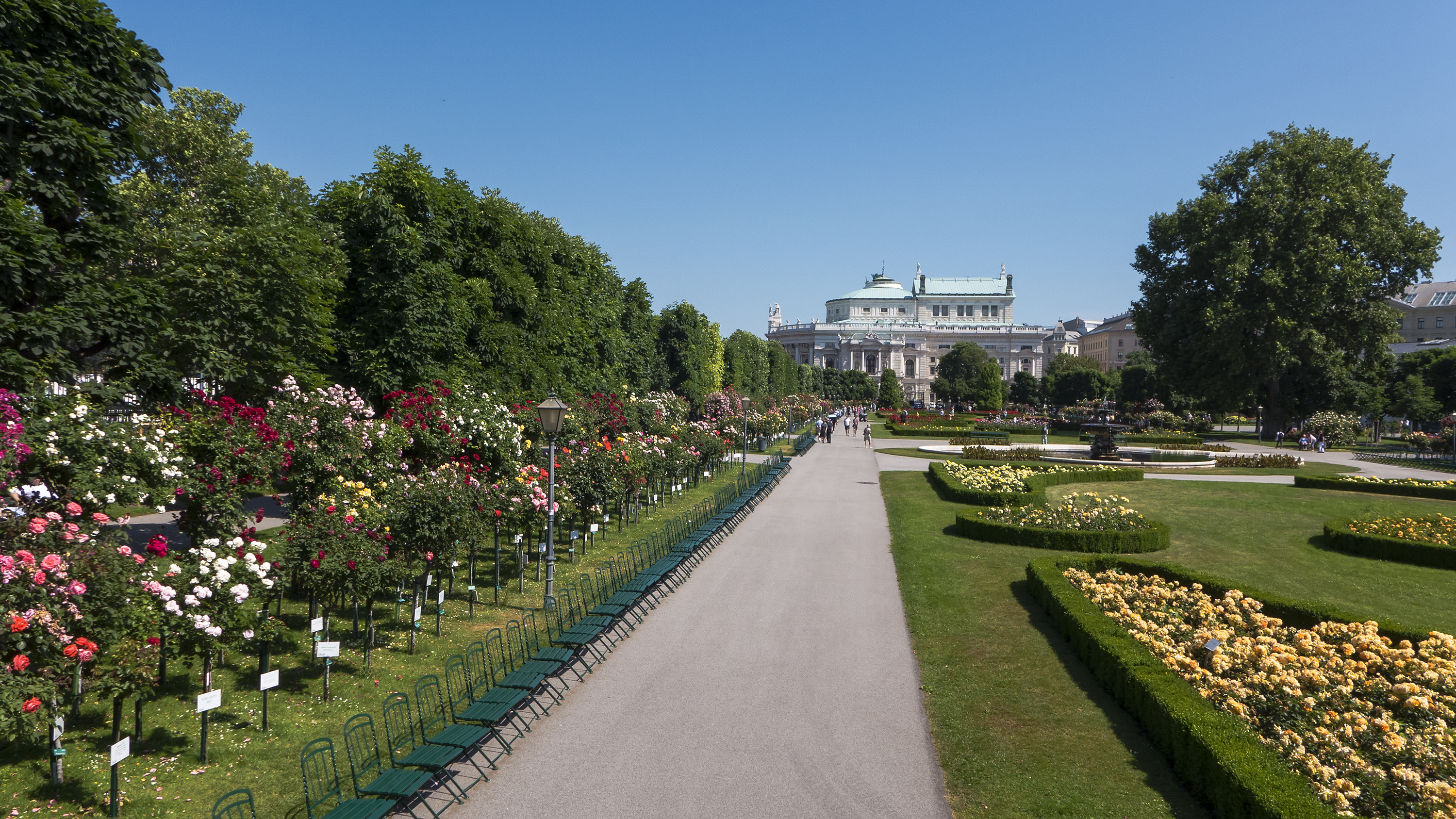 Volksgarten in Wien 1